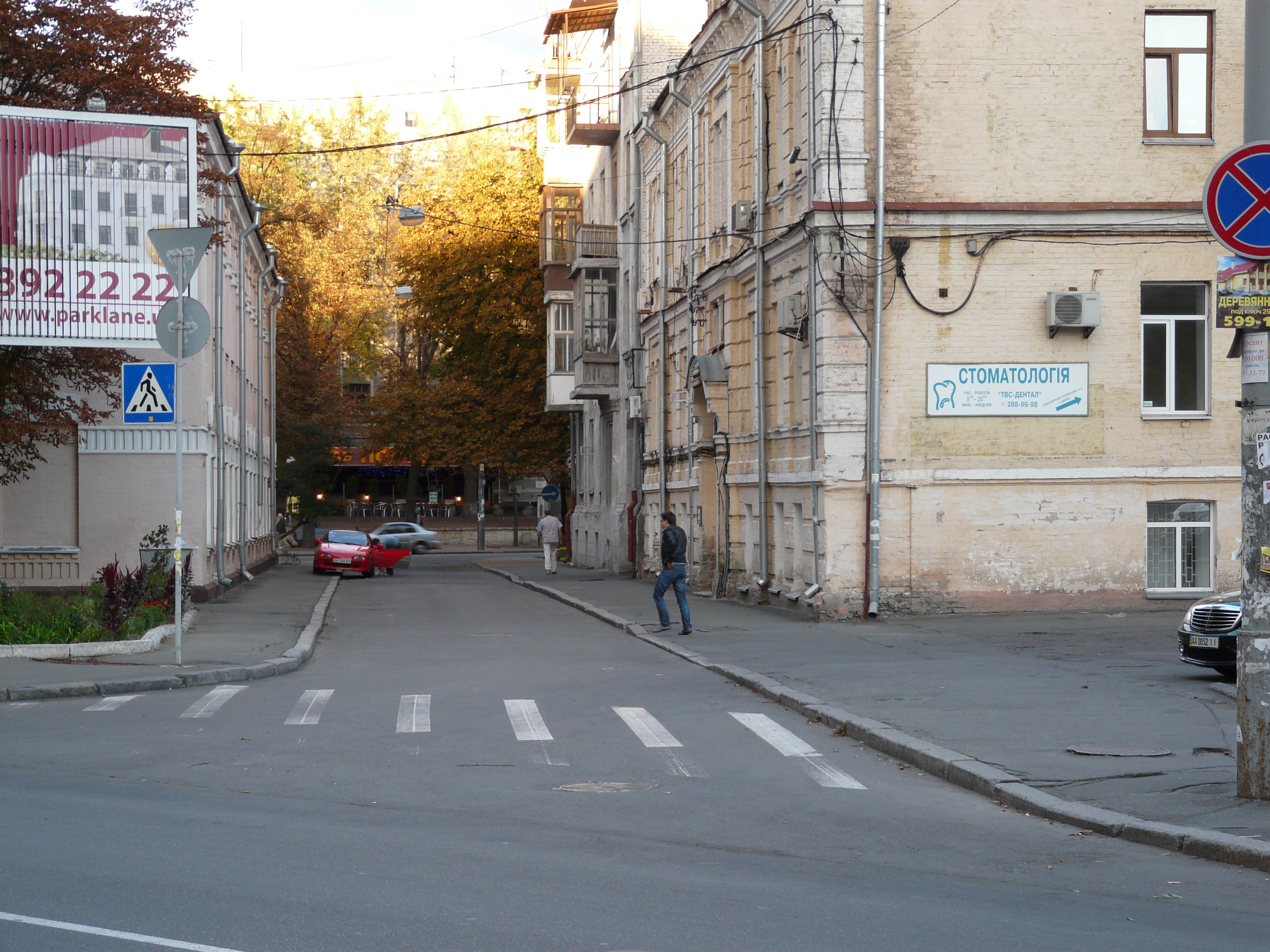 Інженерний провулок 2.jpg: Вигляд на Інженерний провулок у м. Києві з боку Московської вул.